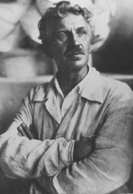 Franz Barwig der Ältere (1886 - 1931)